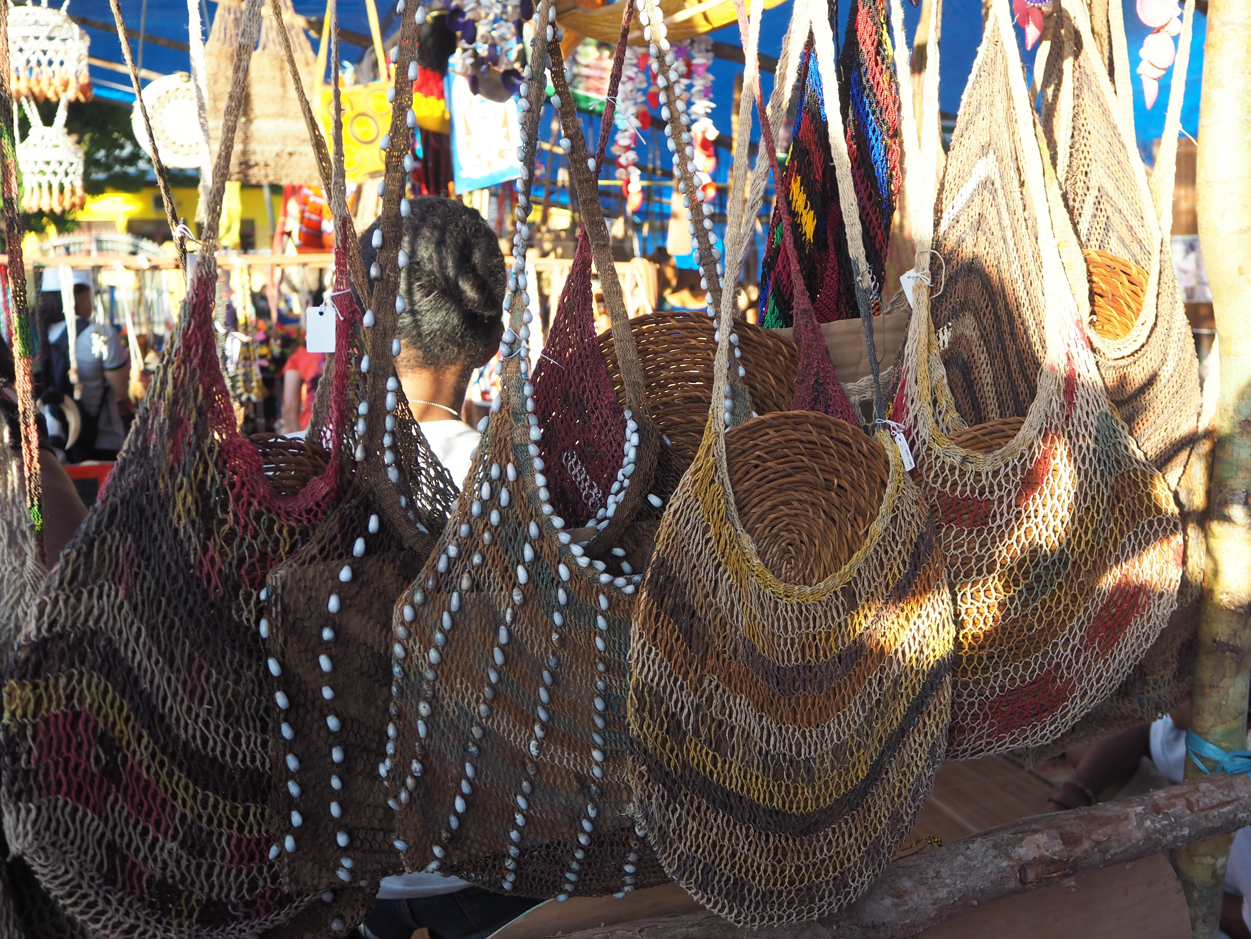 Noken merupakan tas tradisional masyarakat Papua yang dibuat oleh perempuan dengan rajutan tangan dari serat tumbuhan. Masyarakat Papua biasanya menggunakannya untuk membawa hasil-hasil pertanian seperti sayuran, umbi-umbian dan juga untuk membawa barang-barang dagangan ke pasar. Noken sudah diakui UNESCO sebagai warisan budaya tak Berbenda dari tanah Papua pada 4 Desember 2012.